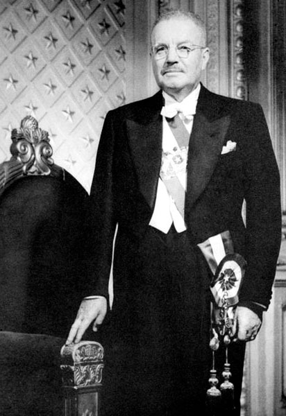 Fotografía oficial de Carlos Ibáñez del Campo, Presidente de Chile (1927-1931, 1952-1958), durante su segundo mandato.